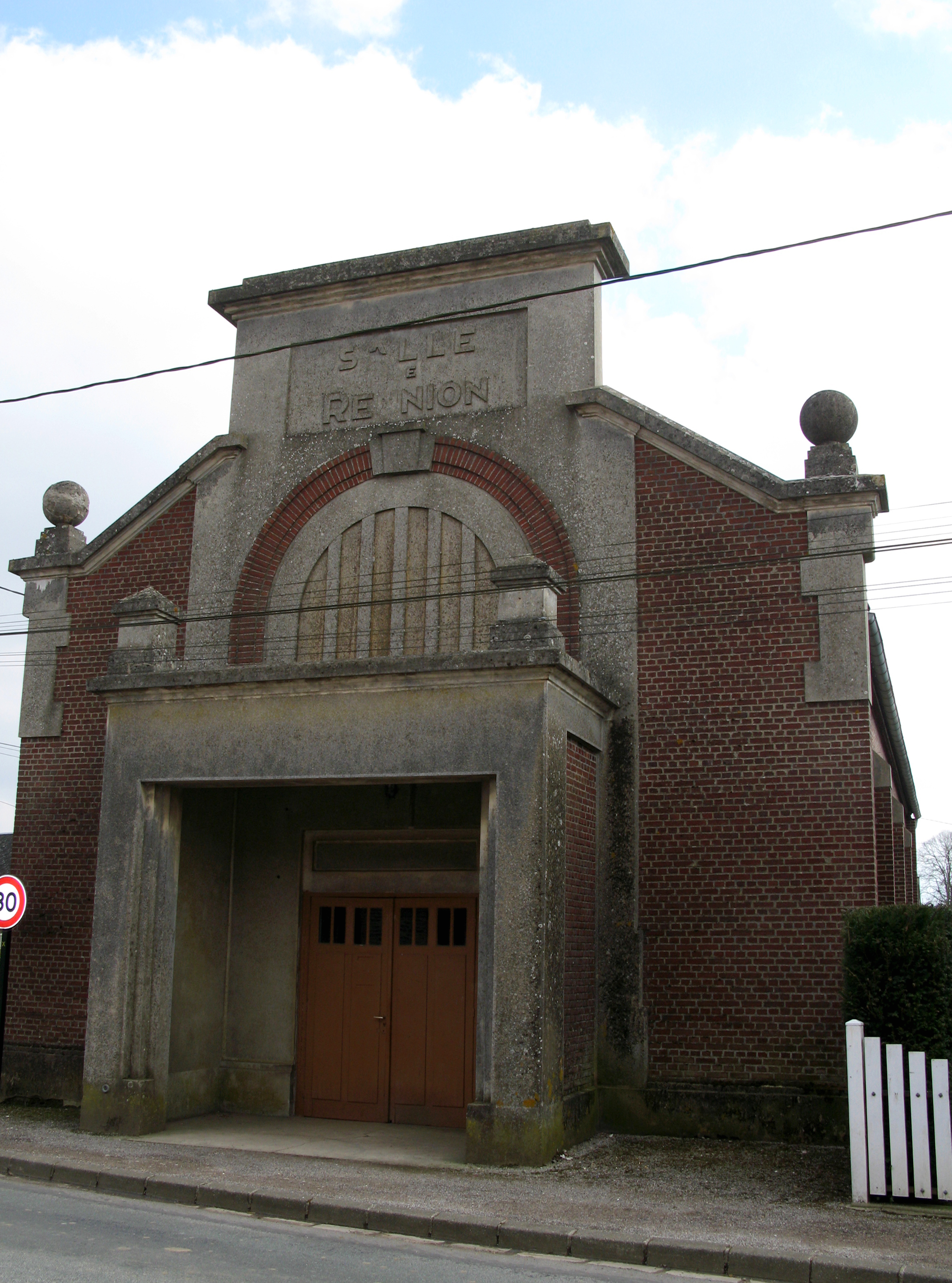 Acheux-en-Amiénois (Somme, France) - La salle de réunion fait pratiquement face à la Ruelle Saint-Jean qui mène au cimetière.